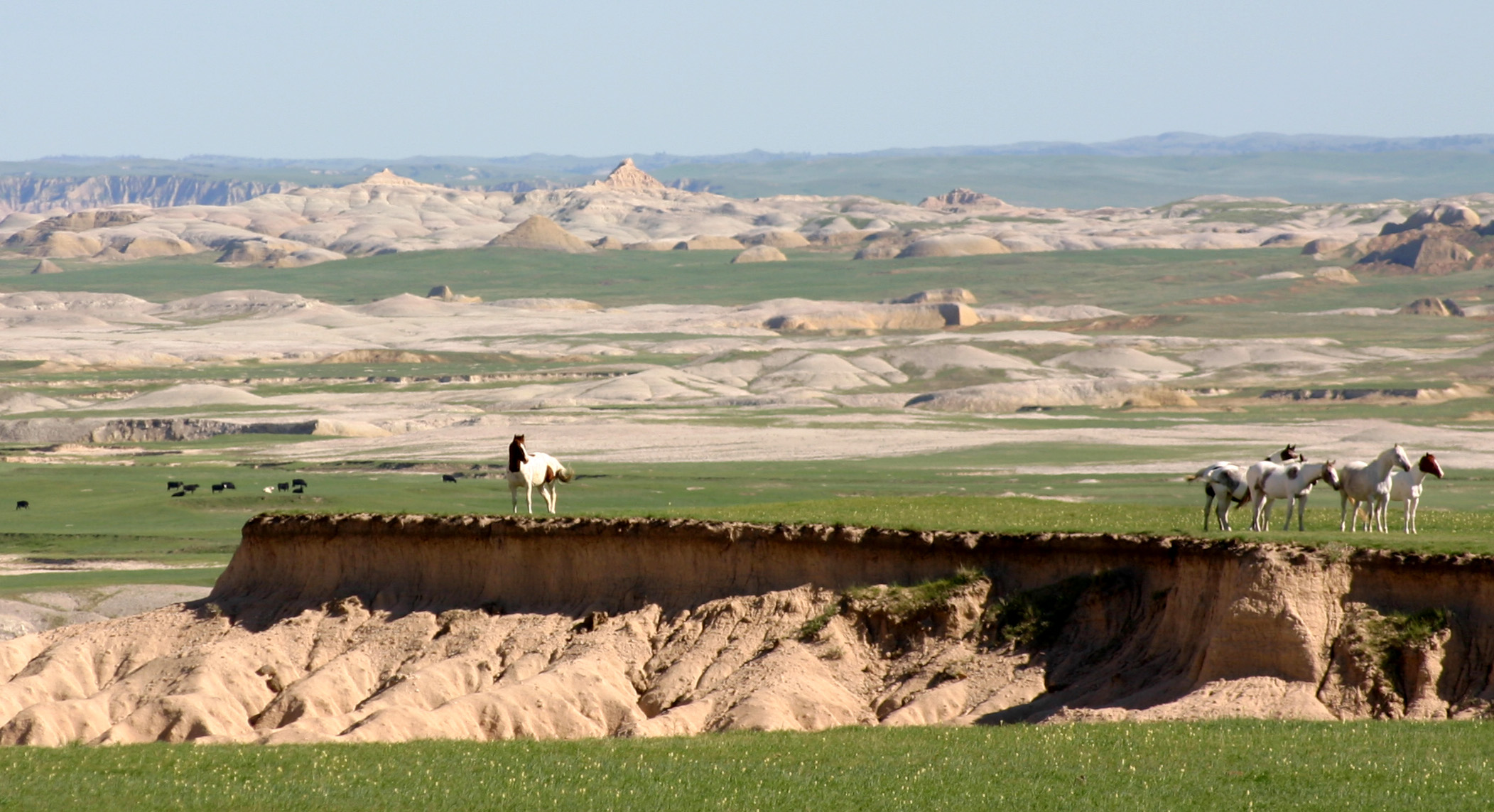 Badlands, USA